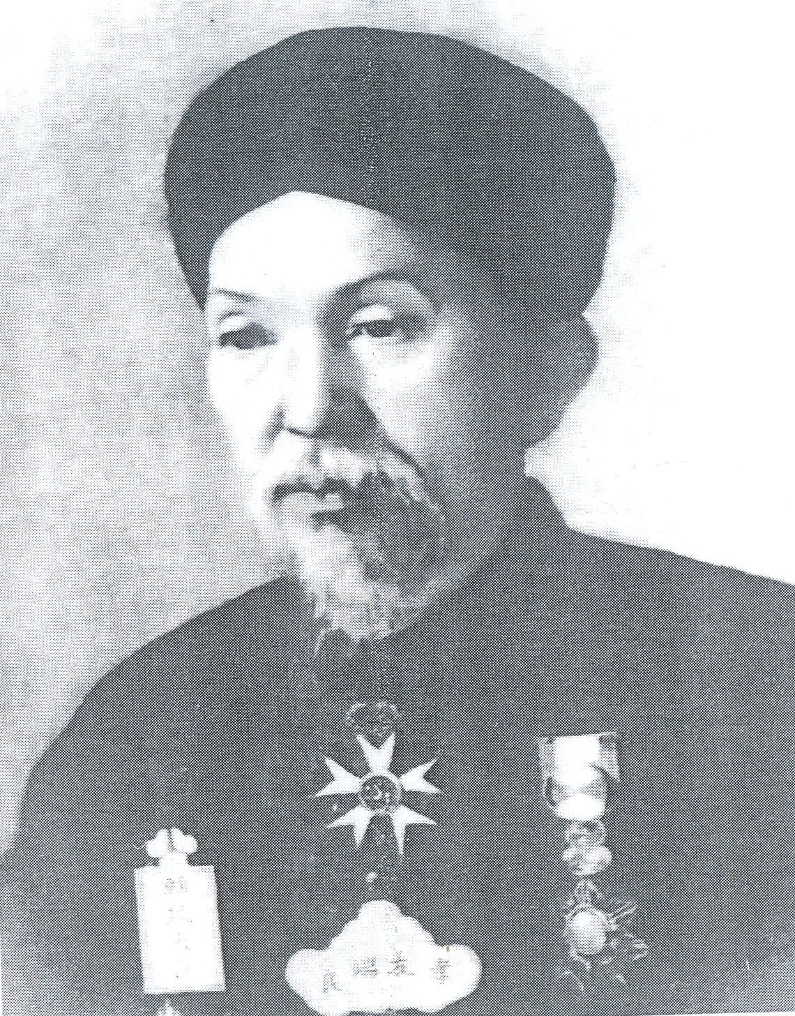 Chân dung quan đại thần Nguyễn Tuyên (阮瑄, 1834 - 1902).